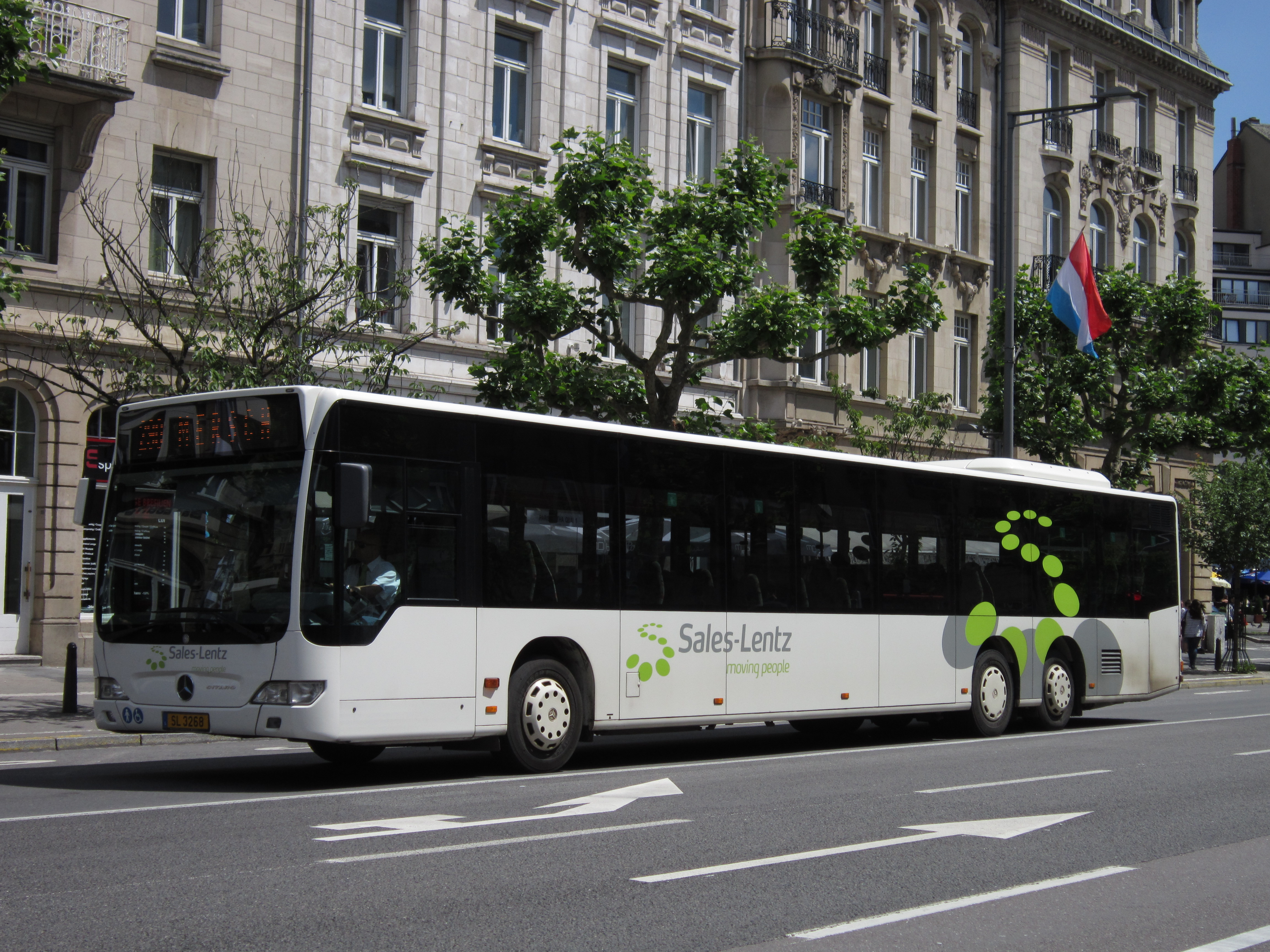 Autobus grande longueur sur la ligne n°290 du réseau R.G.T.R.